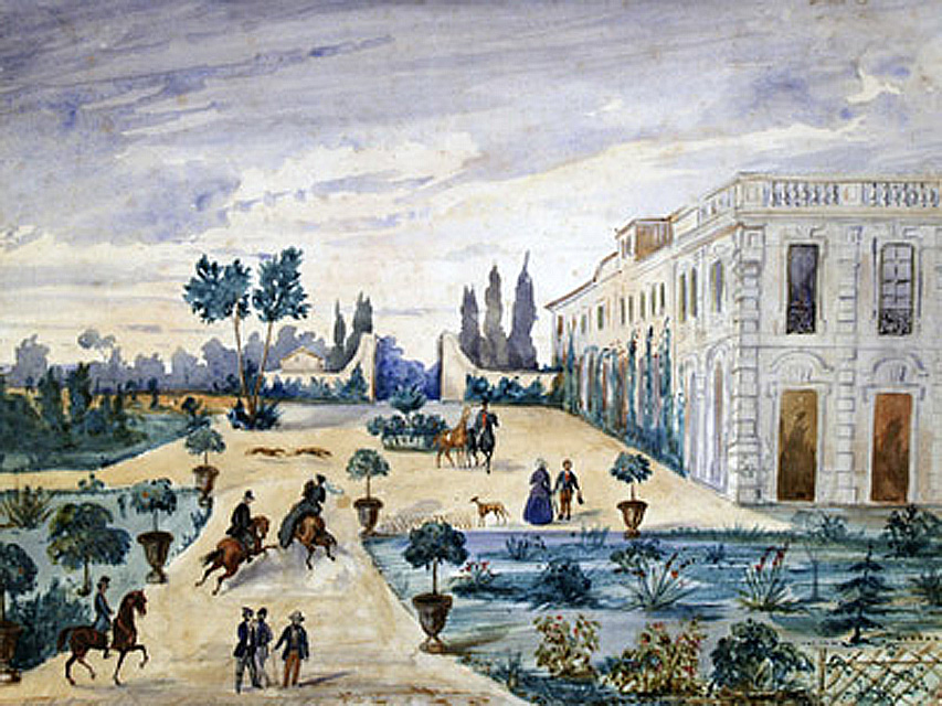 Château d'Espeyran à Saint-Gilles-du-Gard, Centre national du microfilm et de la numérisation